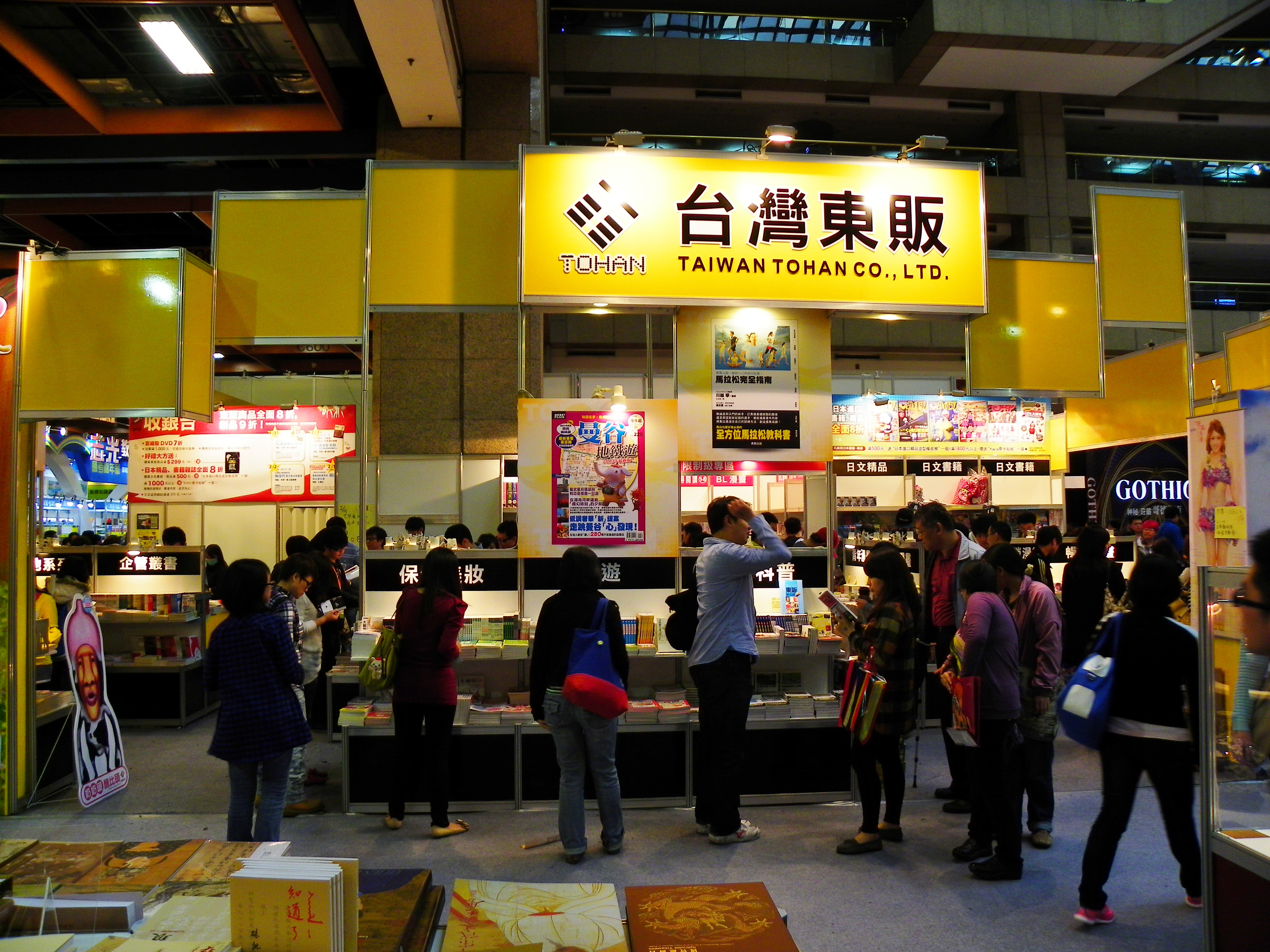 2013年臺北國際書展，世貿一館台灣東販攤位。